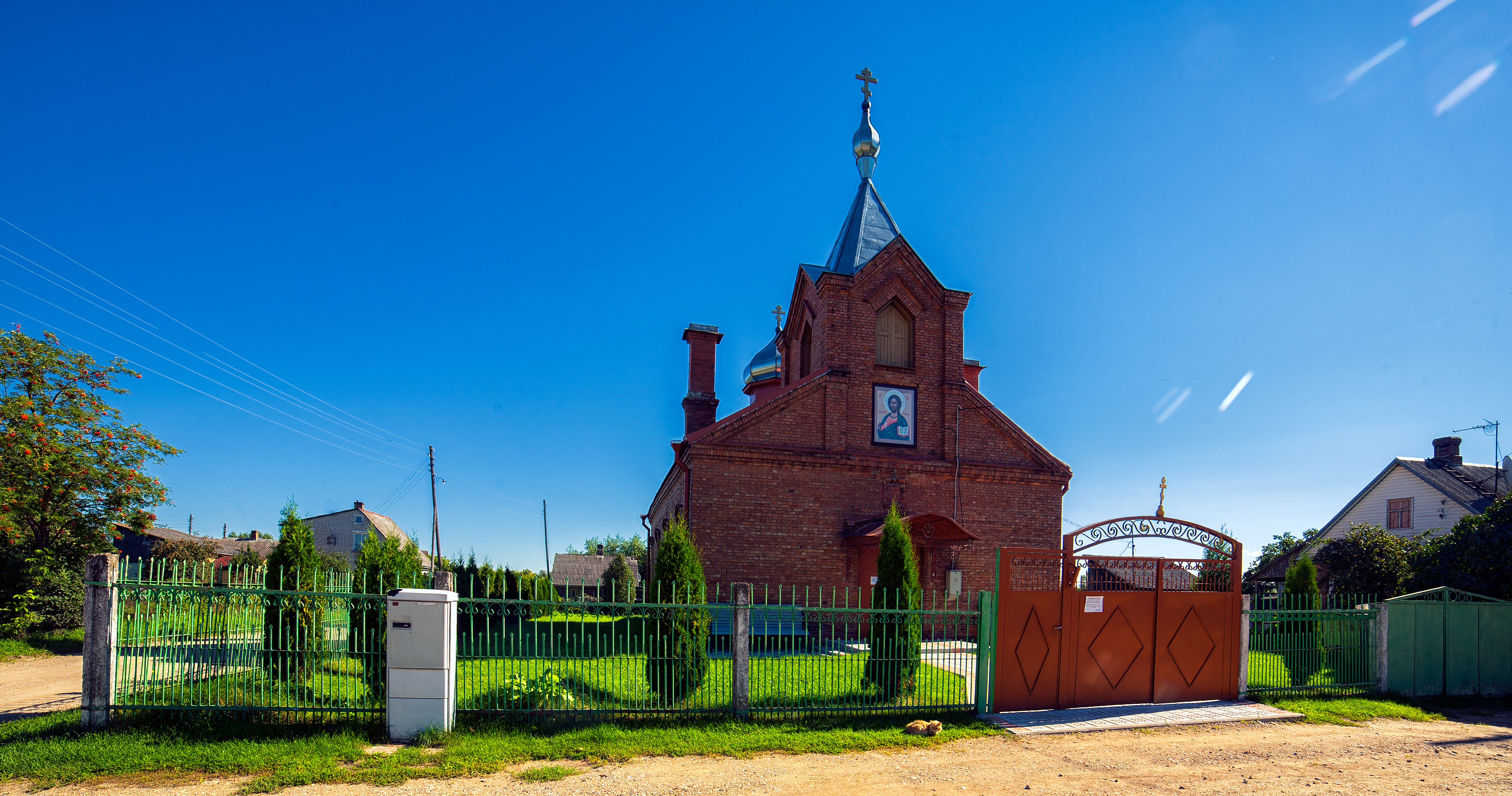 Nīderkūnu vecticībnieku lūgšanas nams